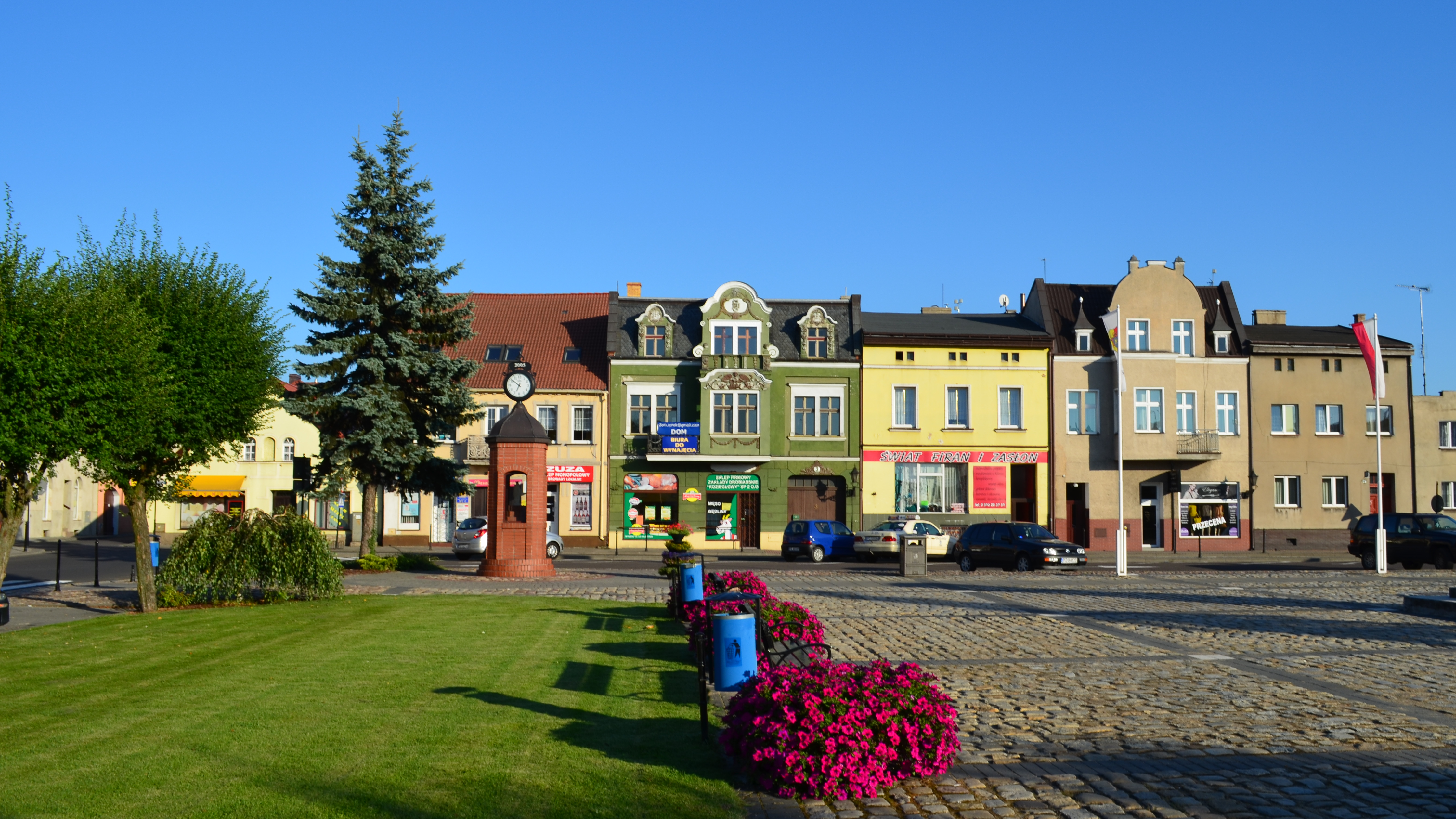 Stęszew - historyczny układ urbanistyczny, XIV, pocz. XX